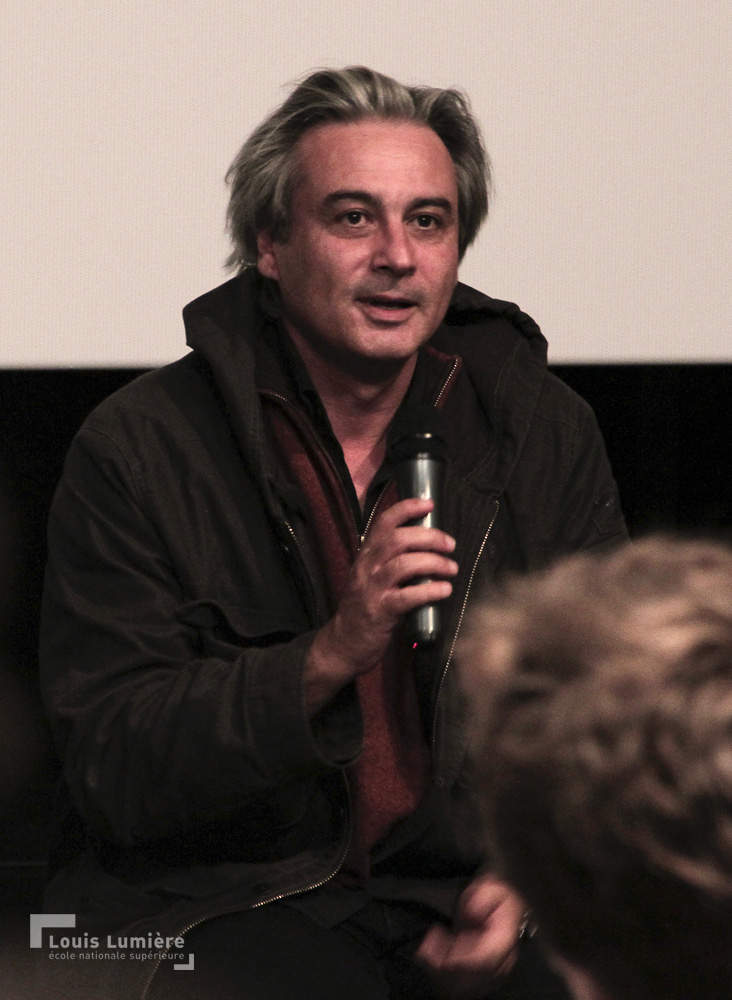 Gilles Bourdos lors d'une présentation à l'ENSLL